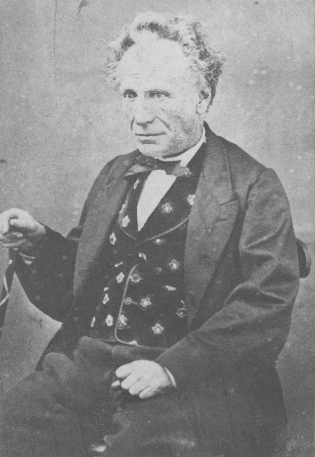 El presidente de la República del Ecuador, Jerónimo Carrión, alrededor de 1875.